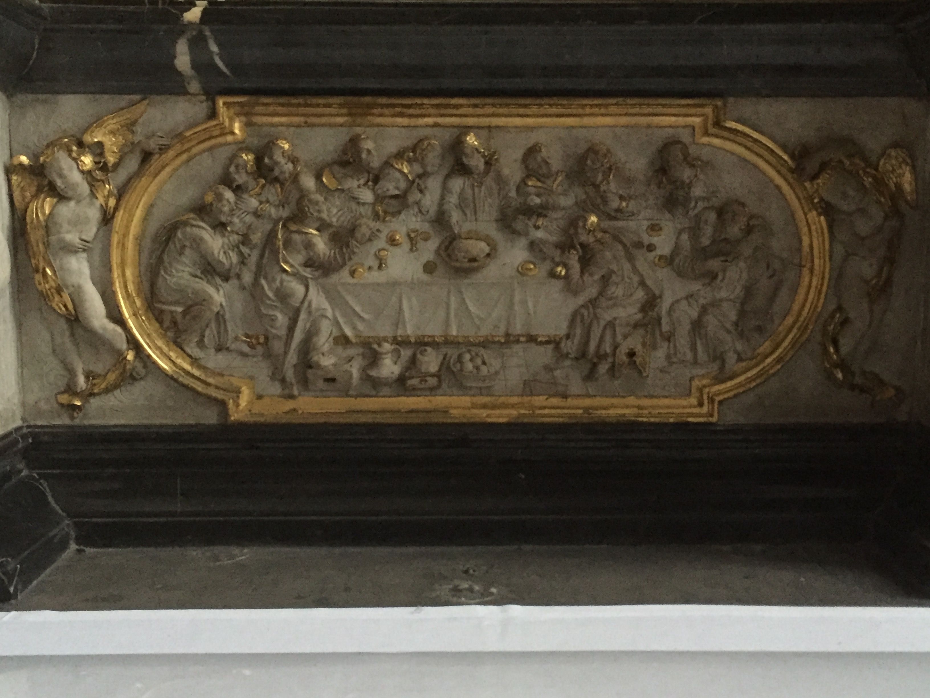 Darstellung des letzten Abendmahls in der lutherischen Pfarrkirche Marburg